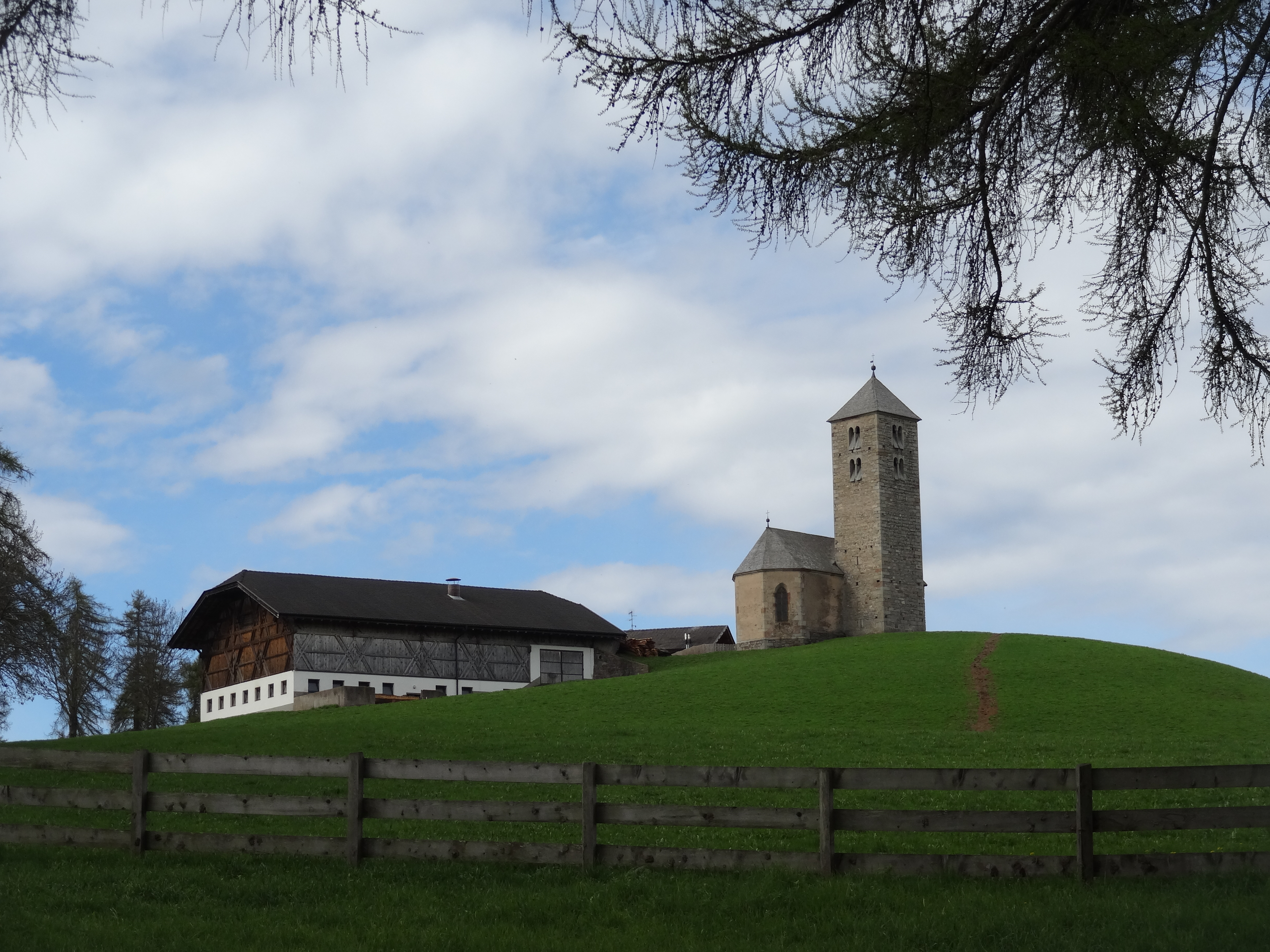 Langfenn auf dem Salten mit Kirchlein St. Jakob